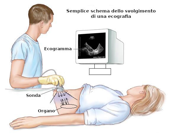 Schema che illustra l'esecuzione di una ecografia